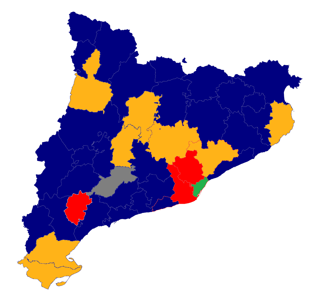 És un mapa de Catalunya de les comarques amb l'afiliació política del president de cada consell comarcal. Convergència i Unió (blau): 34 comarques Partit dels Socialistes de Catalunya (vermell): 5 comarques Esquerra Republicana de Catalunya (taronja): 1 comarca Independents (blanc): 1 comarca